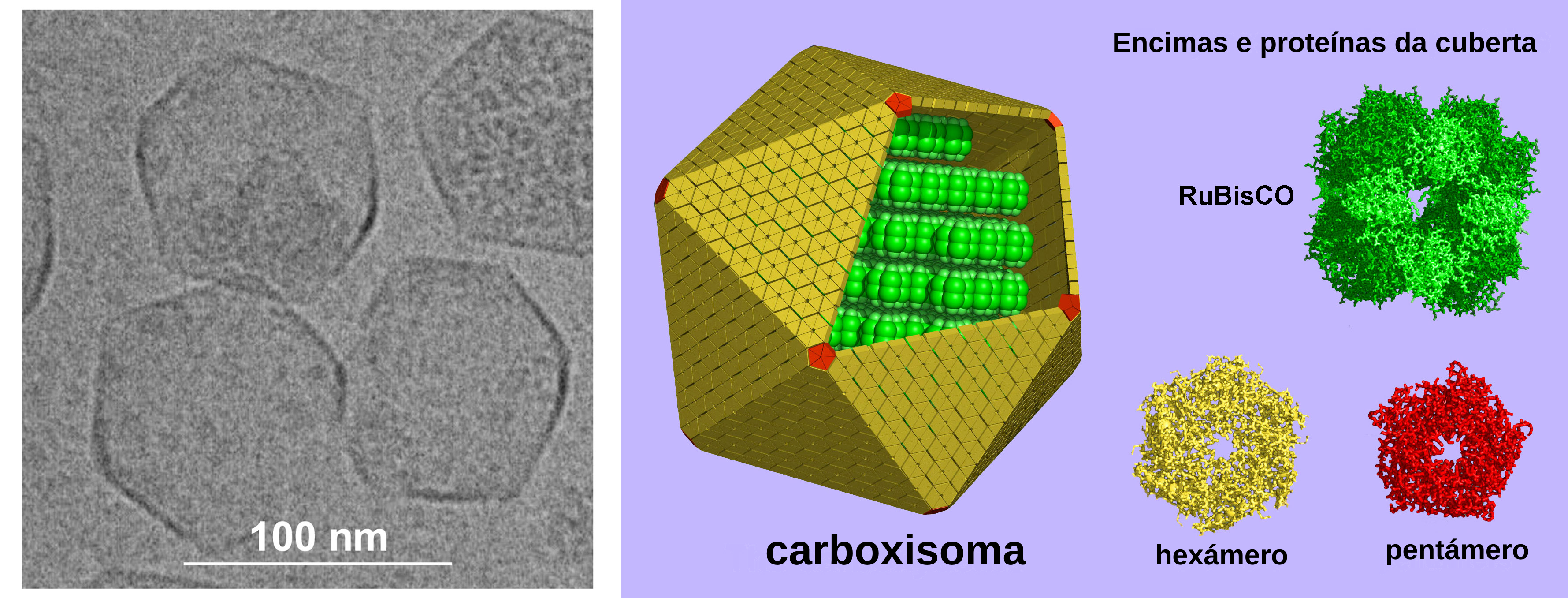 O carboxisoma e as proteínas que ocompoñen.